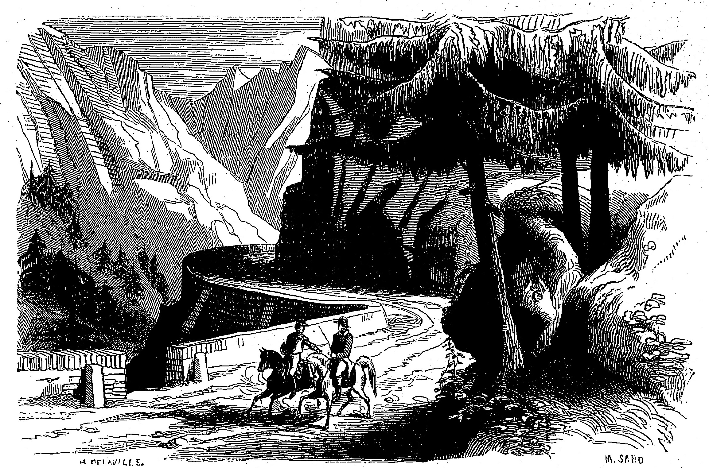 Illustration de Maurice Sand pour la nouvelle de George Sand "Lavinia", dans George Sand, "Oeuvres illustrées", Paris, Hetzel, volume 5, 1853, p.117.